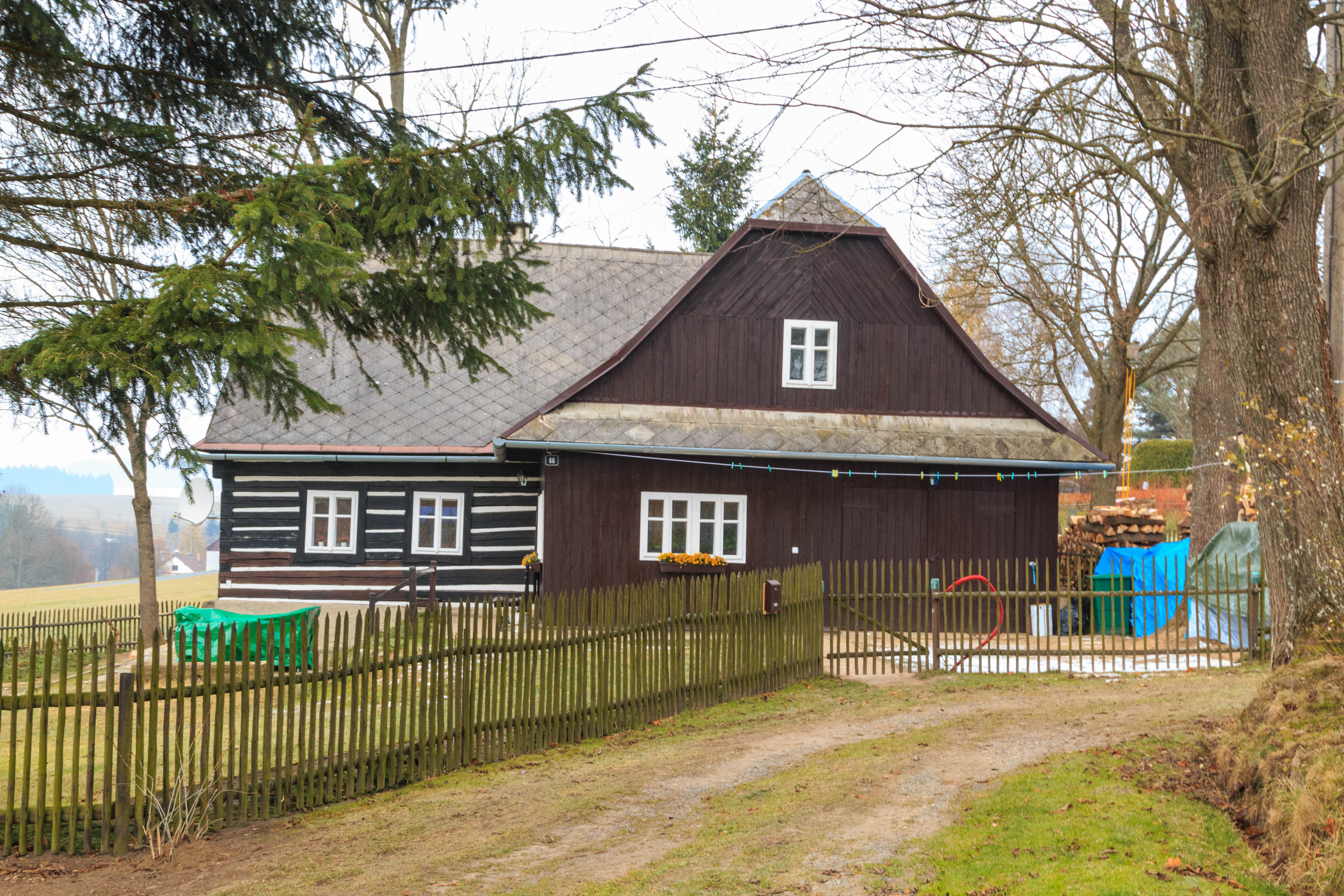 Bořina u Kuklíku - čp. 66